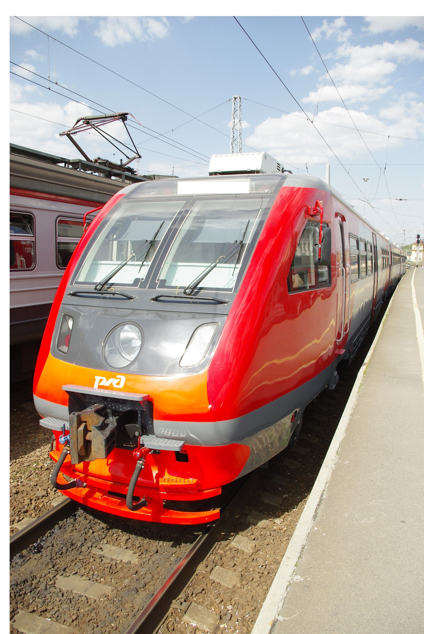 Презентация рельсового автобуса РА2